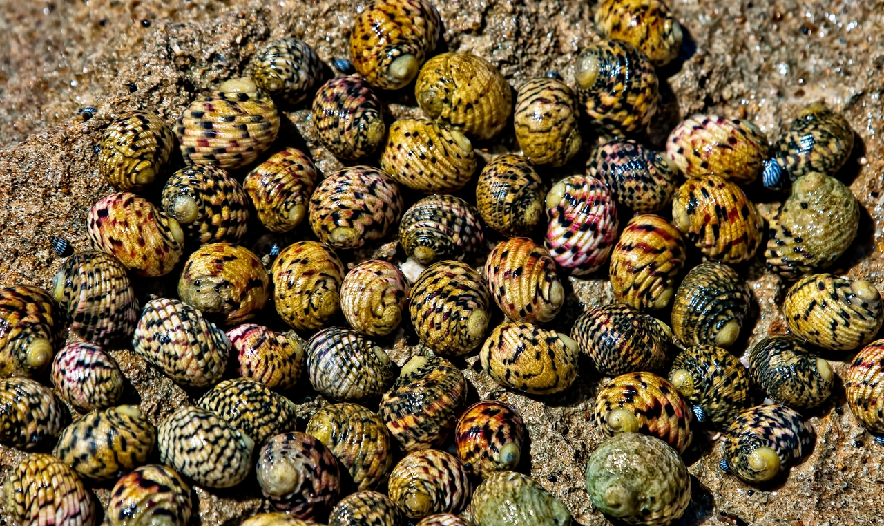 Puerto Rico Mar bella Puerto Nuevo